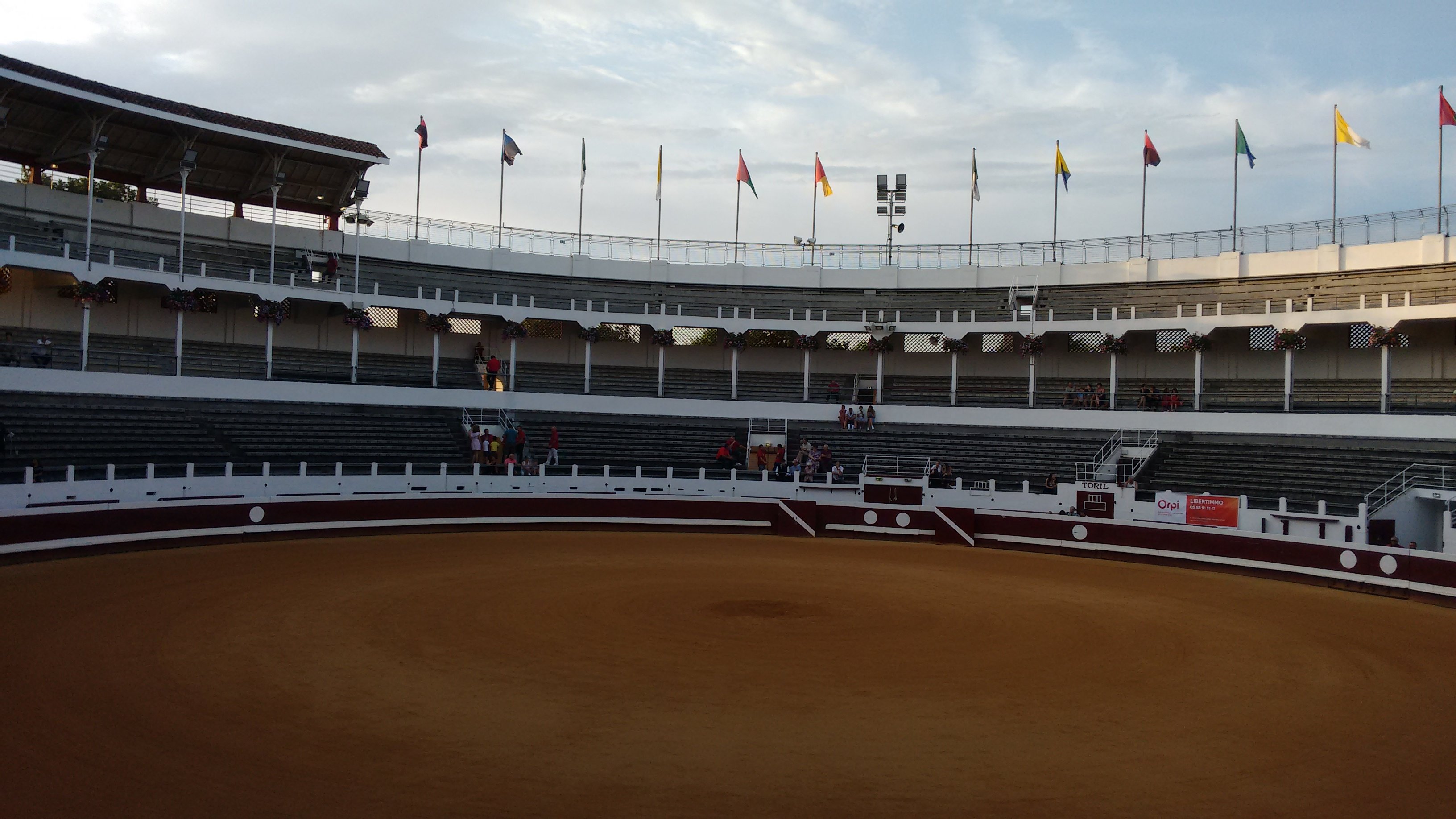 Photo des arènes de Dax en hiver.